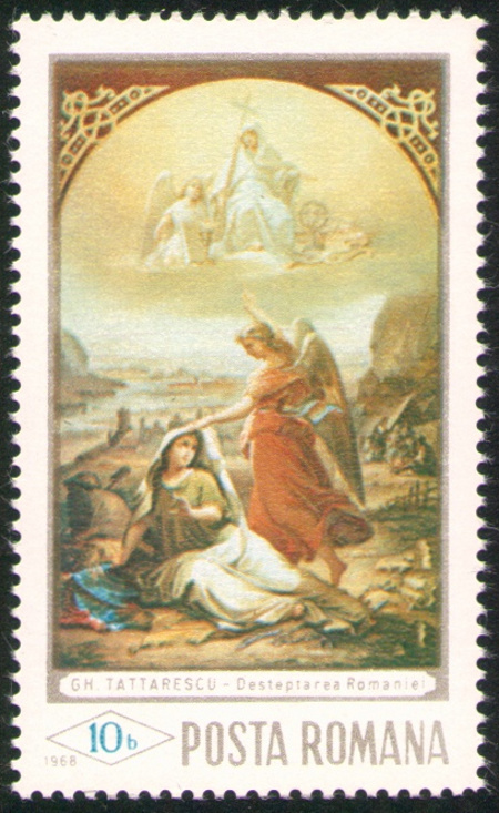 Gheorghe Tattarescu - Renașterea României (timbru) (1968)